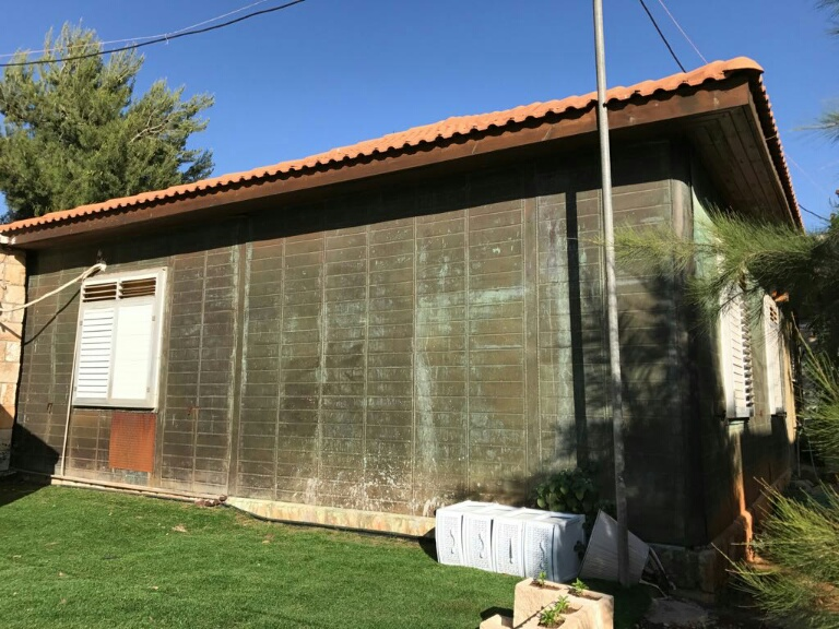 בית הנחושת של משפחת רוקנשטין, הנמצא בתוך מתחם "ארוח רוקנשטין", הר כנען צפת. הובא לארץ מגרמניה ב-1933.